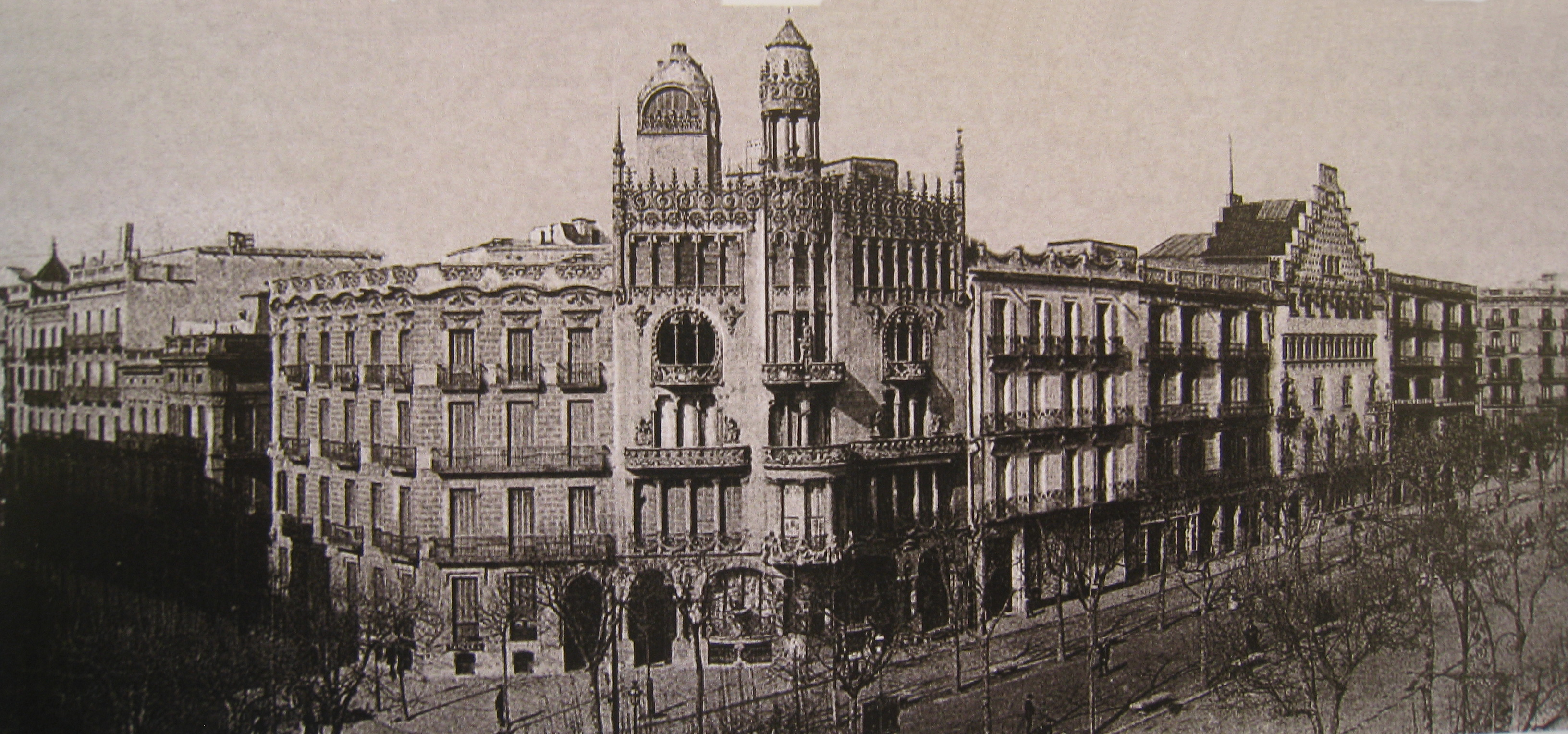 Mansana de la discòrdia (Psg. de Gràcia entre Consell de Cent i Aragó). En primer pla, la casa Lleó Morera. La casa Batlló (1905-1907) encara no estava construïda.